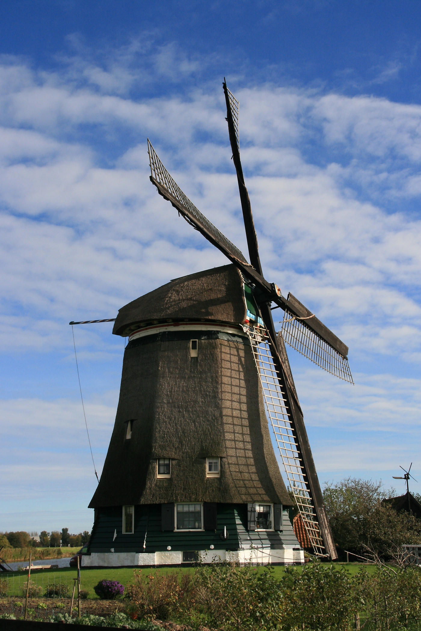 Neck: Neckermolen